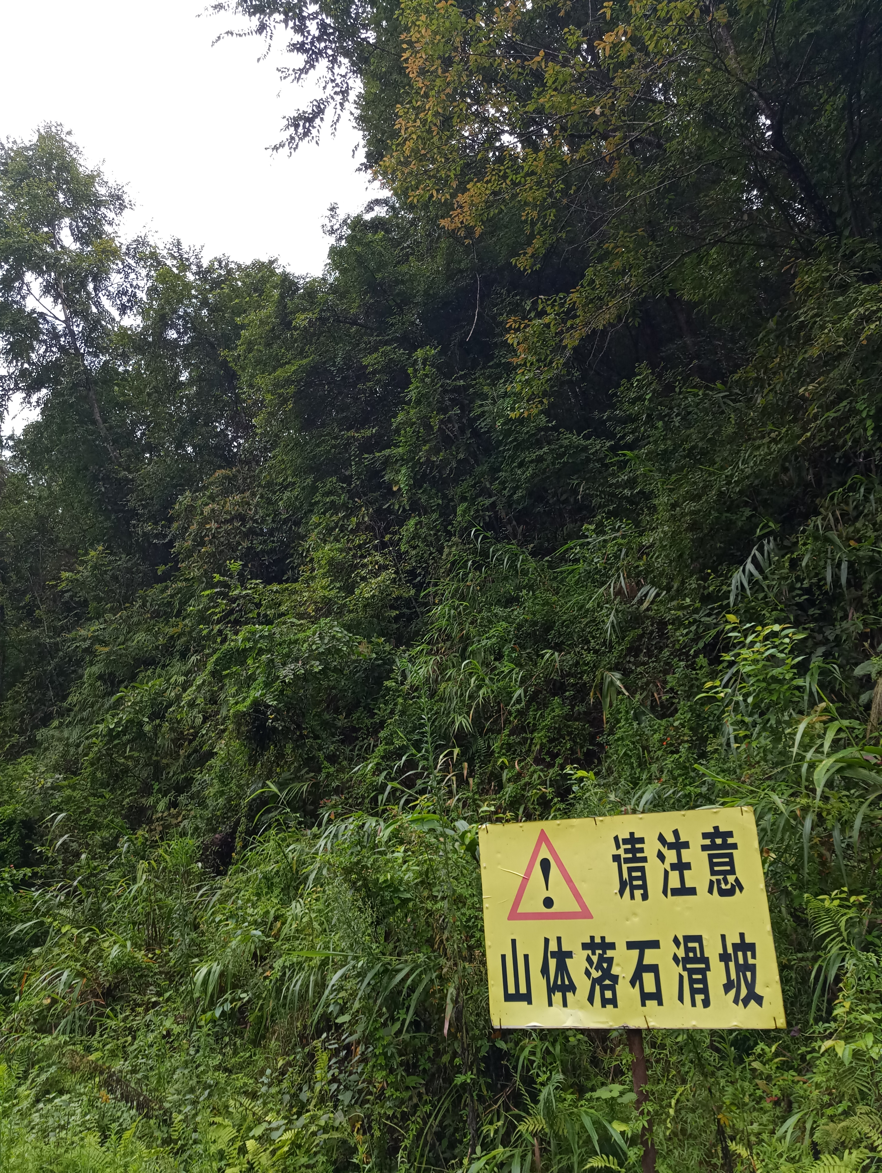 芒市-雷崖让山-山体滑坡警示